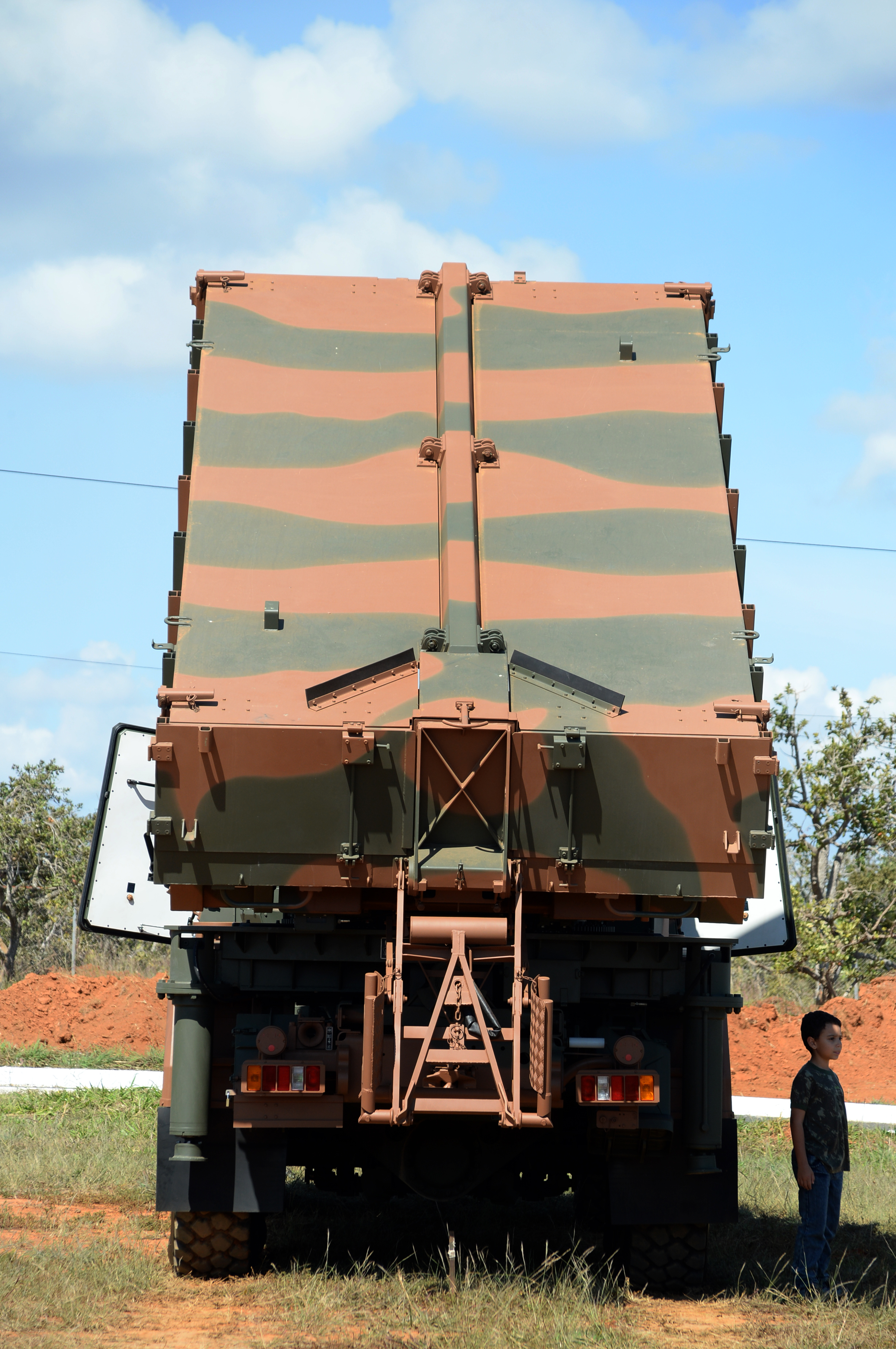 06/06/2014, Formosa - GO Fotos: Jorge Cardoso